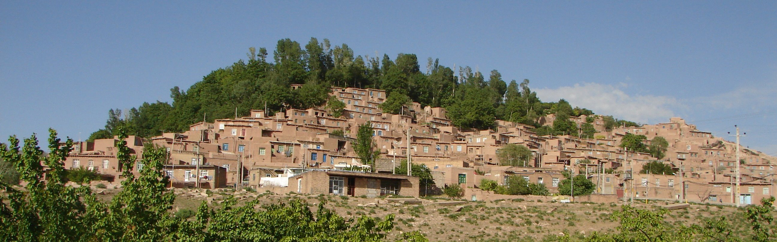 زنوزق